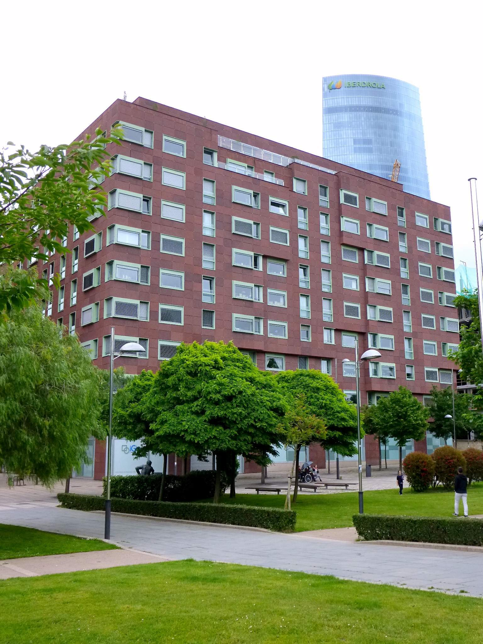 Paseo de Rafael Sánchez Mazas (Bilbao)